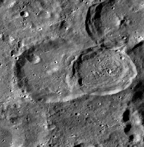 Cráter lunar Huggins. (Imagen LRO)